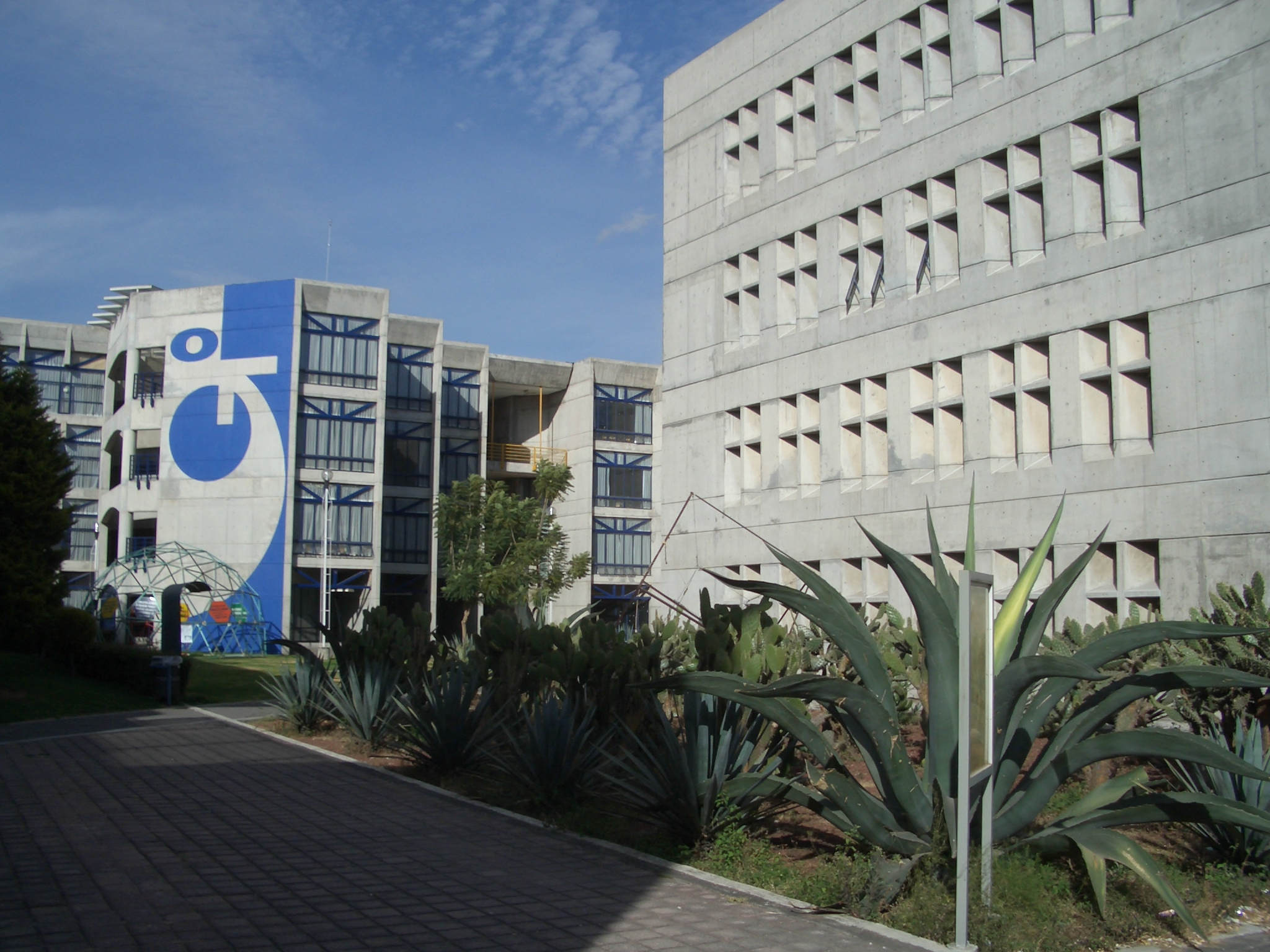 Foto del edificio O de la UAM-Xochimilco